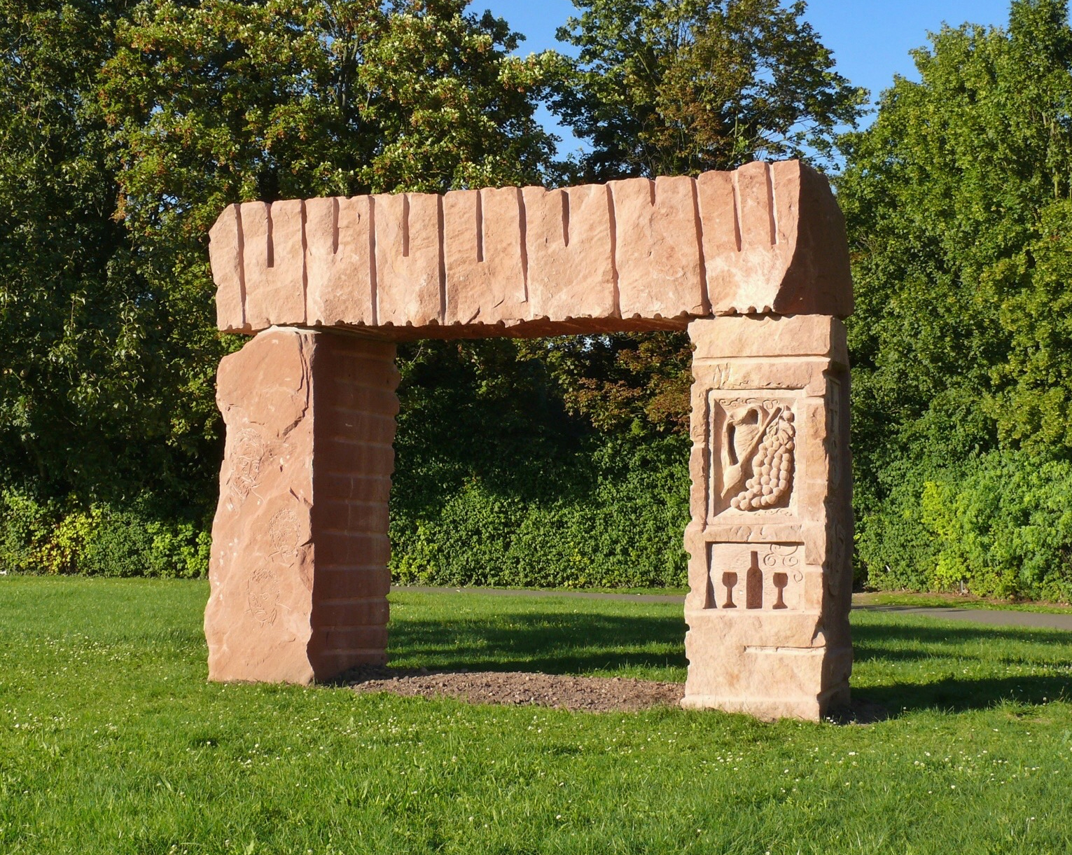 Rheinhessentor in Nieder-Olm, Rheinhessen, Deutschland. Sechs Betriebe der rheinhessischen Steinmetz- und Steinbildhauer-Innung haben die viereckigen Säulen des insgesamt 18 Tonnen schweren Tores mit ihren Arbeiten verziert. Man findet in den Motiven die fünfte, närrische Jahreszeit und die Wappen der Stadt und der Partnergemeinden, ebenso wie die Urkunde der Entstehung Rheinhessens im Rahmen des Wiener Kongress von 1816, das Gebiet der Region im Rheinknie mit den Städten Worms, Mainz, Bingen, Alzey und Nieder-Olm sowie die Größen der Literatur: Carl Zuckmayer, Anna Seghers und Wilhelm Holzamer.